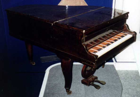 Энгармоническое фортепиано Одоевского в экспозиции Музея им. Глинки